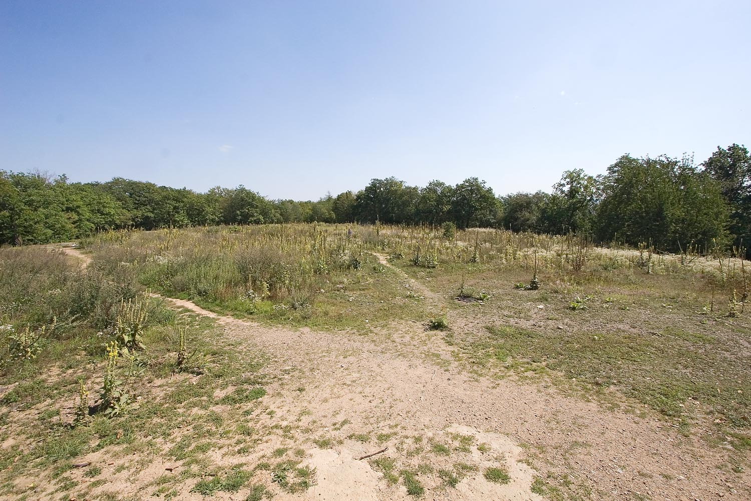 Keltské oppidum Závist u Zbraslavi - Akropole